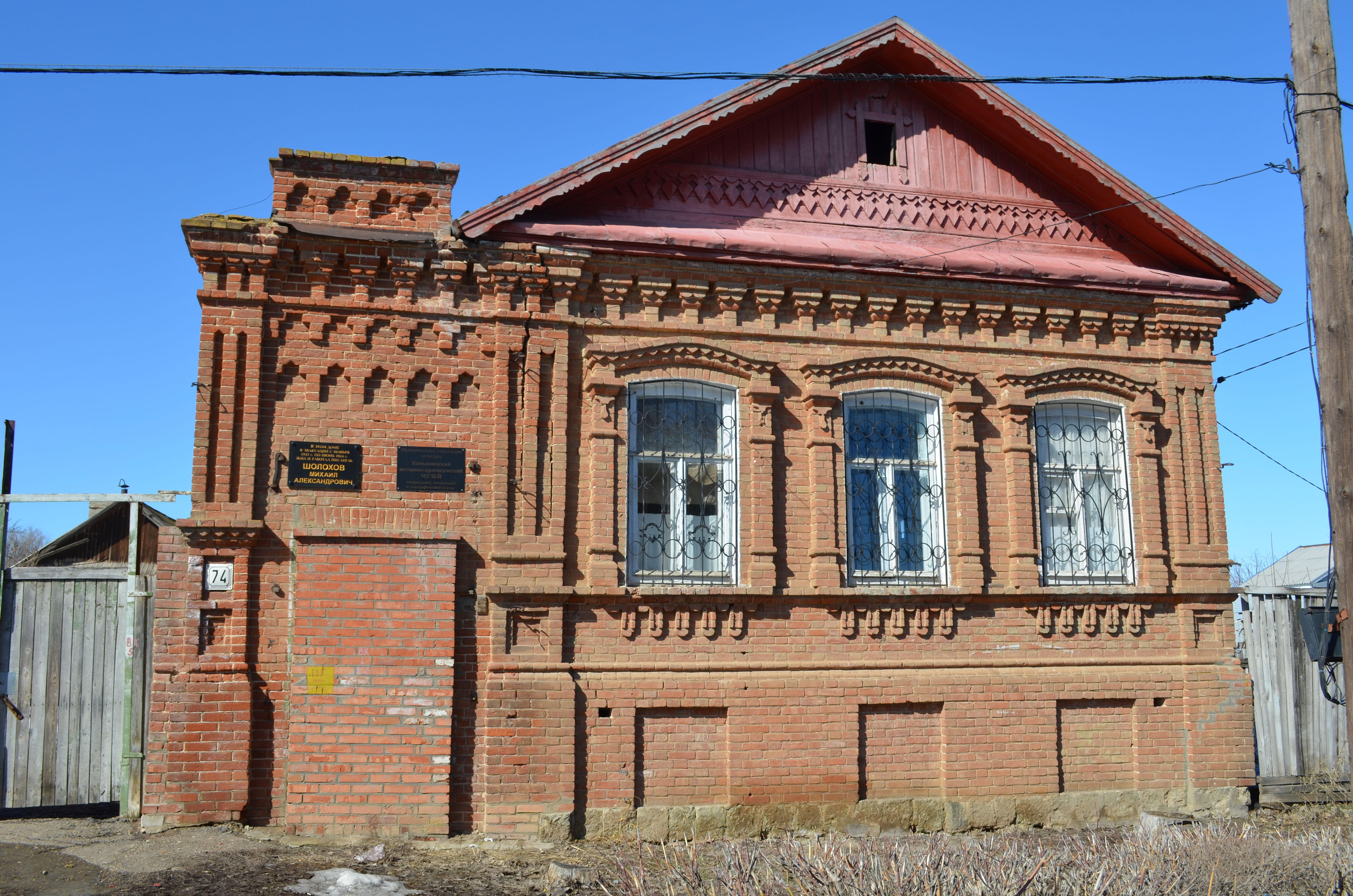 Дом жилой Федосеева: улица Набережная, 74, Камышин, Волгоградская область